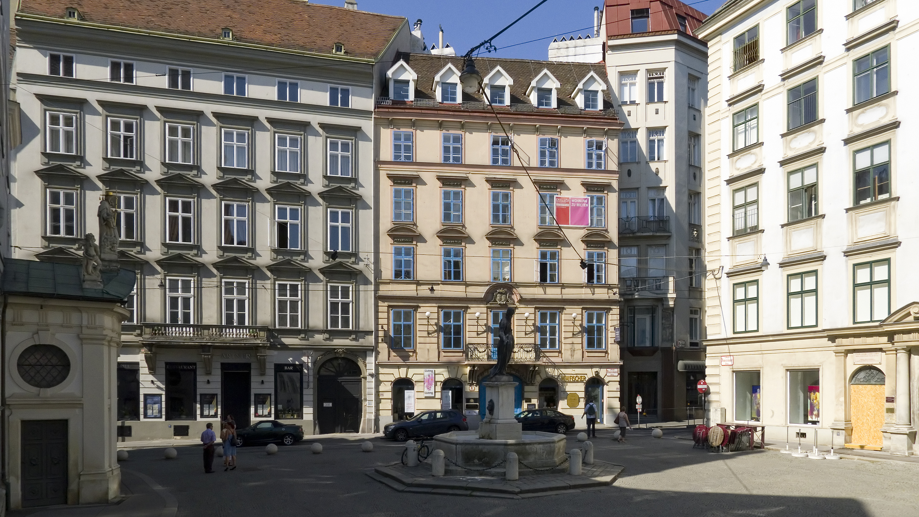 Franziskanerplatz in Wien 1 bei Nr. 3 Richtung Südwesten